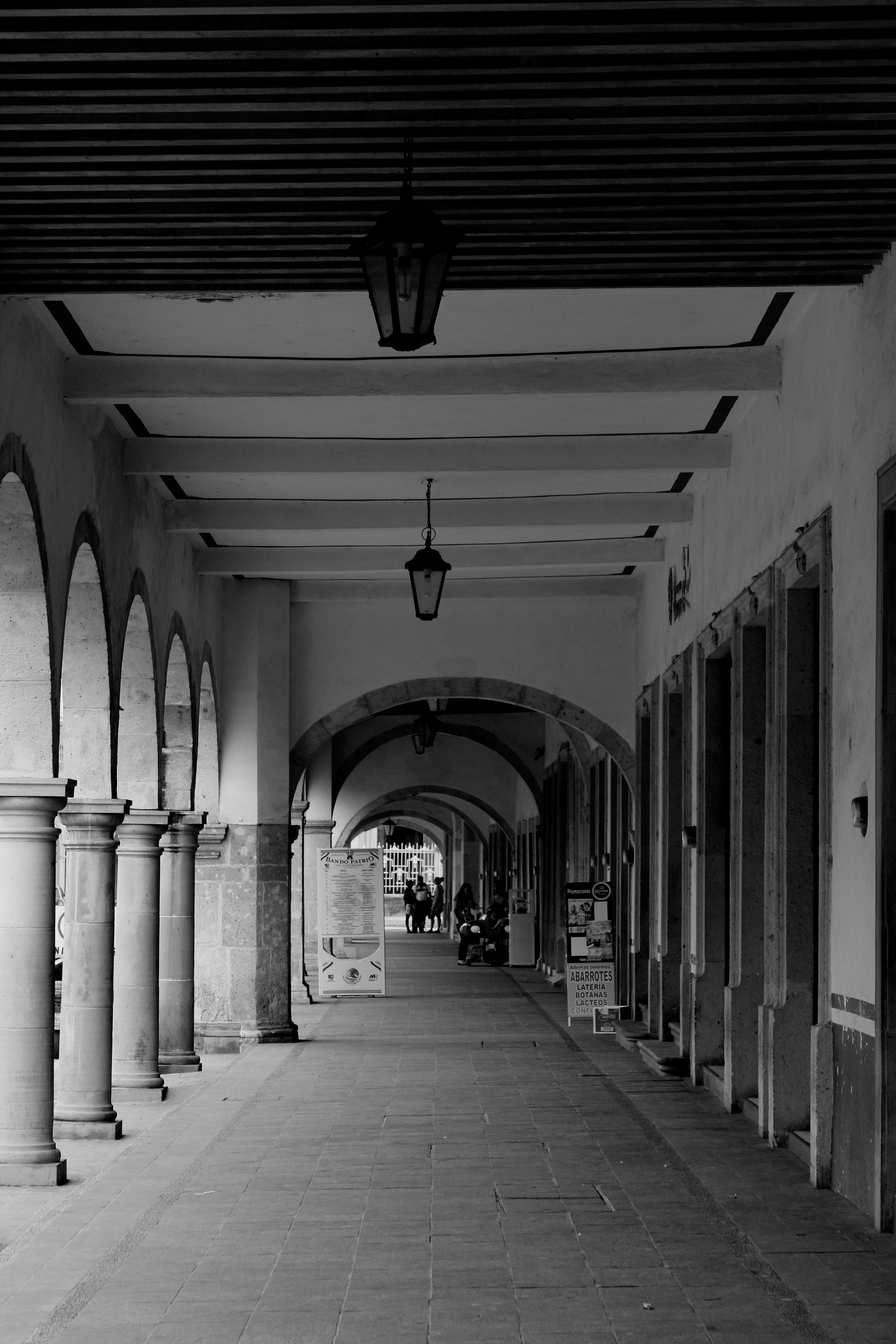 Portales Moroleón